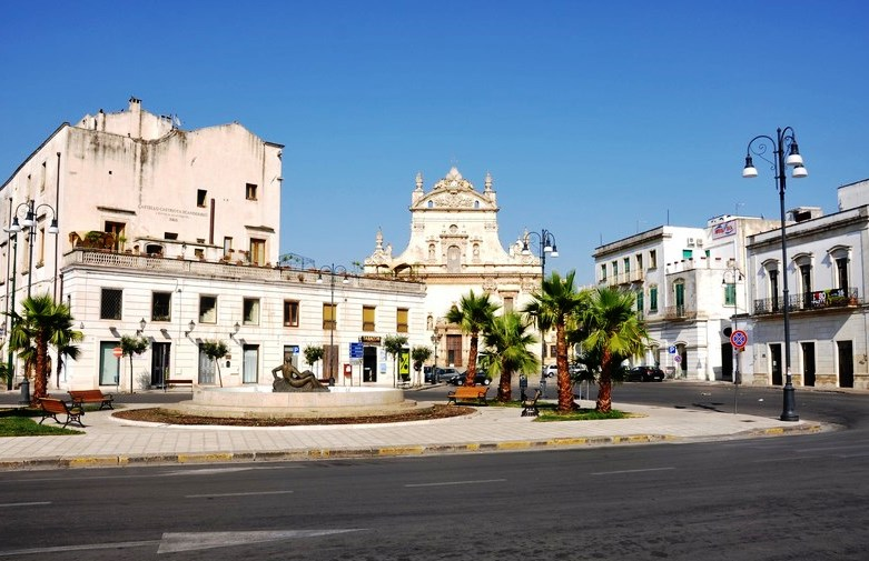 Piazza di Galatina